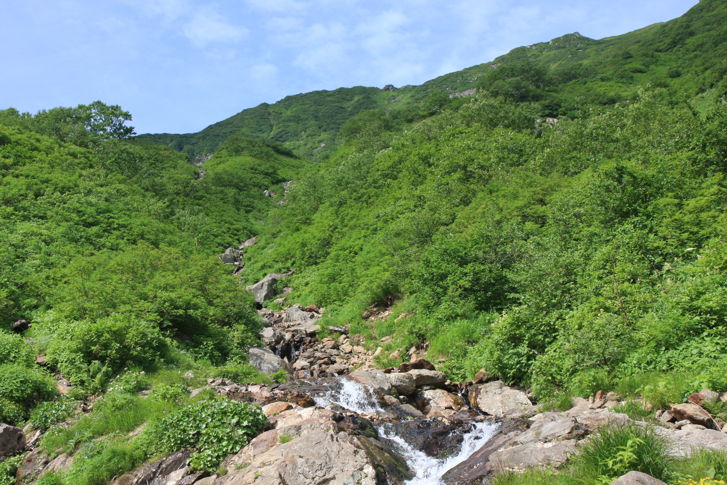 札内川八ノ沢上流部 1300m付近より